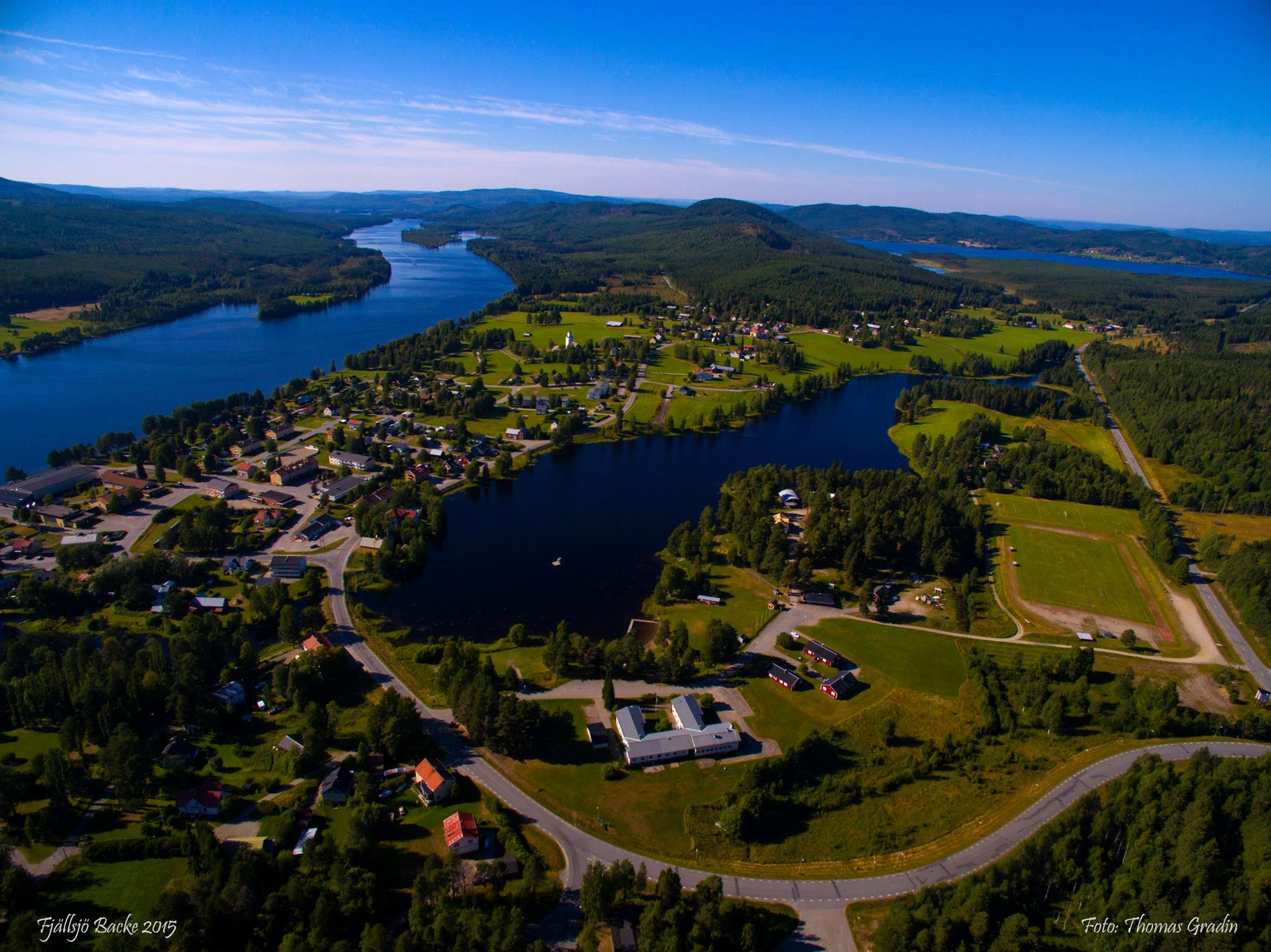 Backe